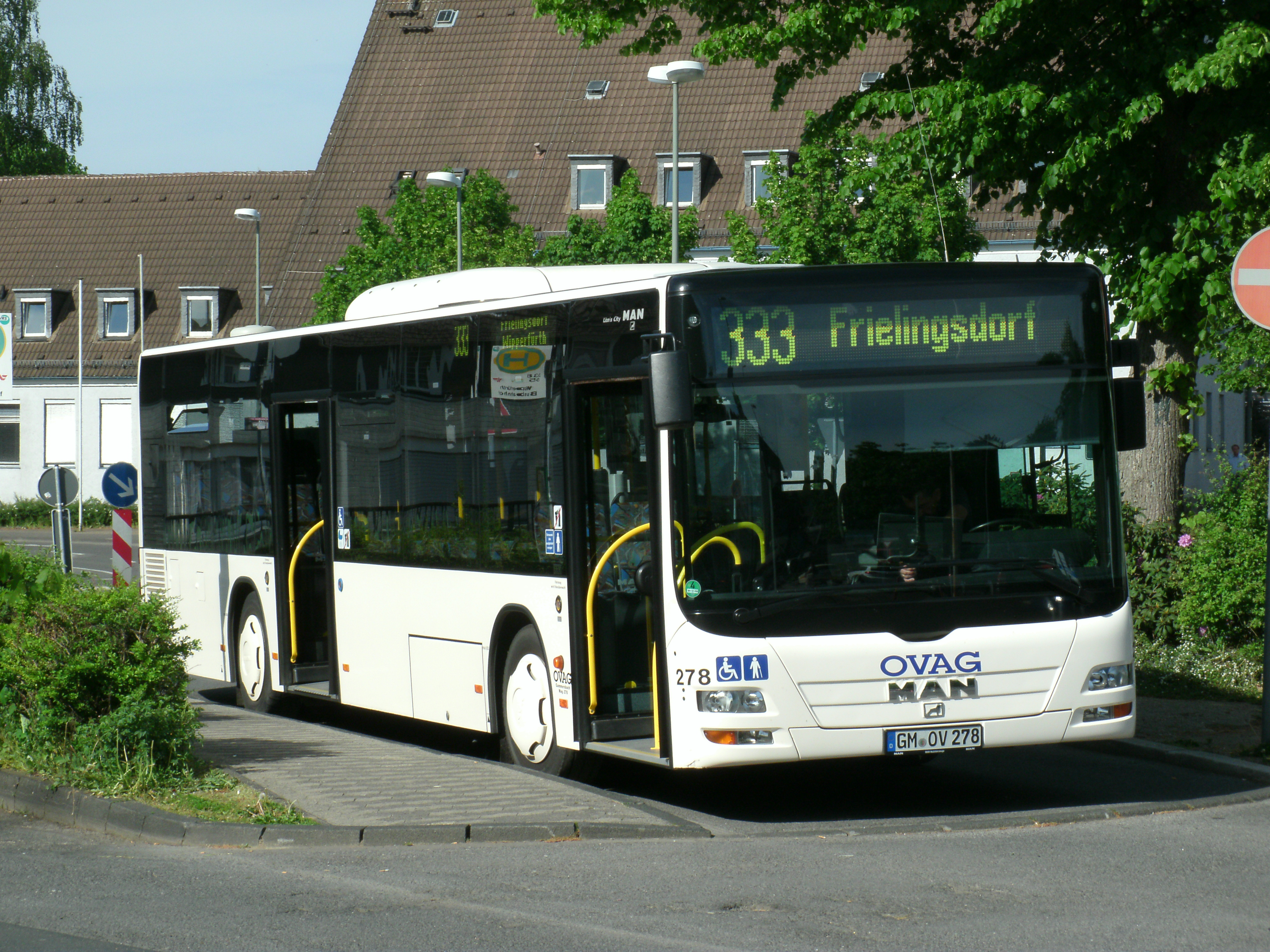 Linienbus der OVAG als Linie 333 am Busbahnhof in Wipperfürth